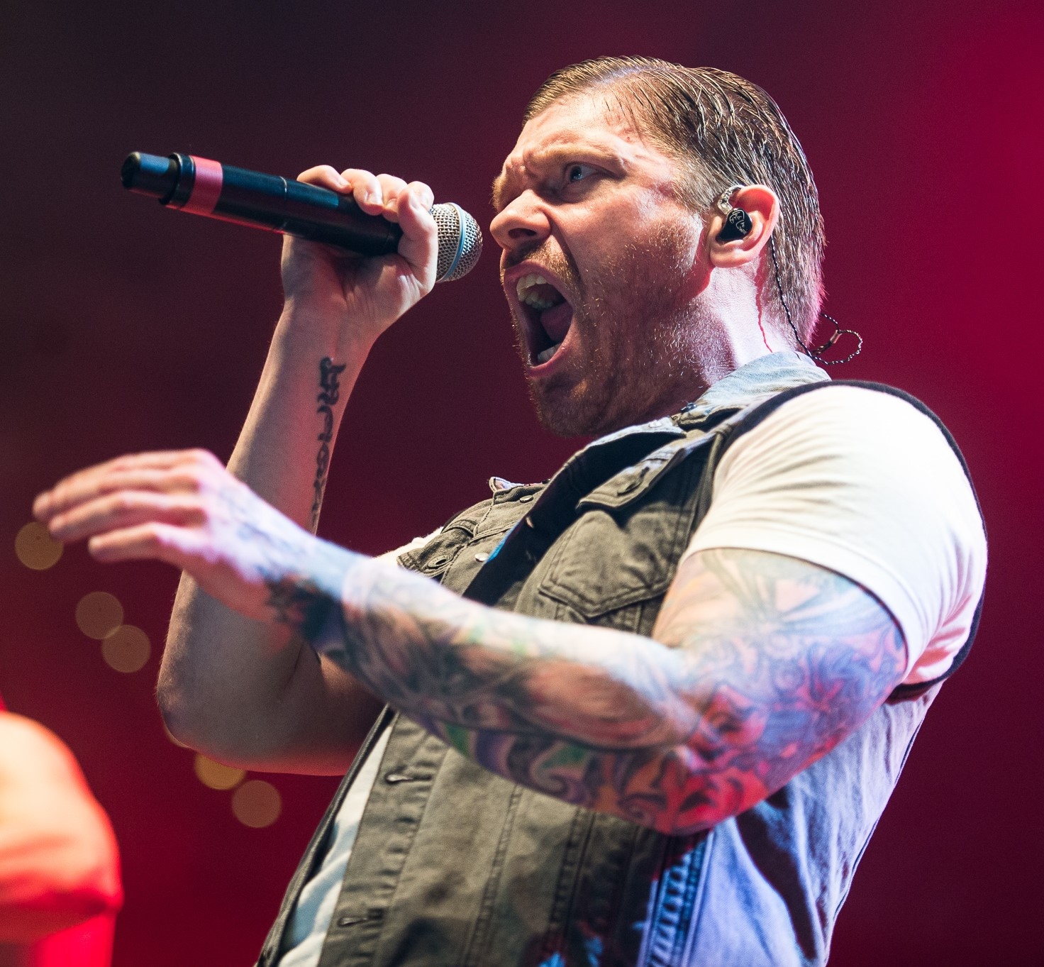 ARGO-Konzerte,Alternarena,Brent Smith,Festival,Konzert,Livekonzert,Livemusik,Musik,RiP,Rock im Park 2016,Shinedown